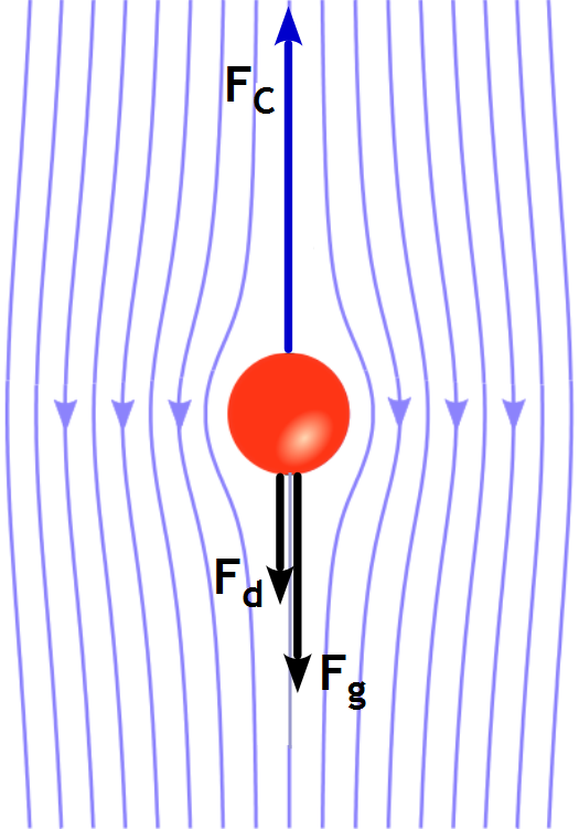 Forces que intervenen sobre la goteta d'oli a l'experiment de Millikan quan puja per efecte d'un camp elèctric. El camp exerceix una força per amunt, la força elèctrica o de Coulomb, i que es veu compensada per les forces de la gravetat i de fregament de Stokes, que apunten per avall.